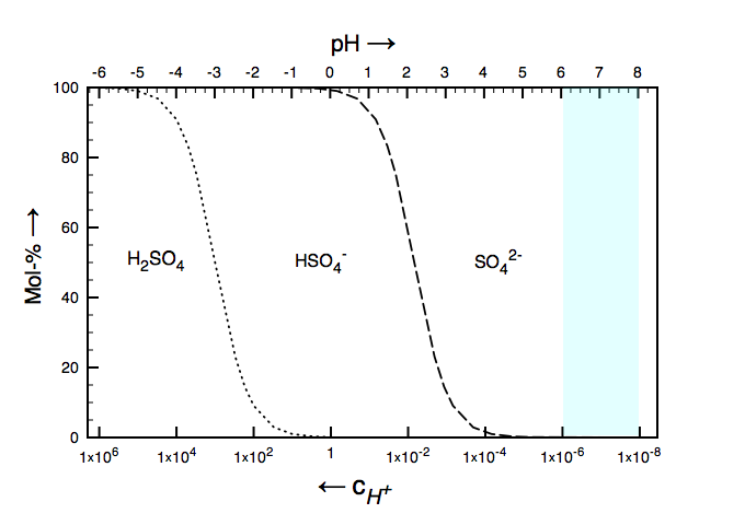 pH-abhängige Verteilung der Sulfate Hydrogensulfate Schwefelsäure